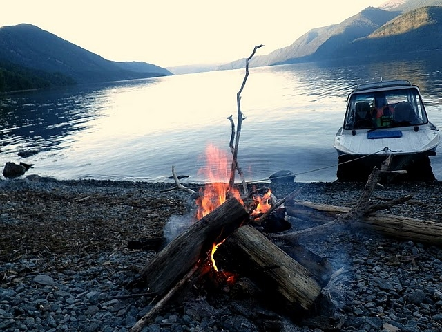 Последний лагерь. Конец августа 2010 г. Телецкое озеро.